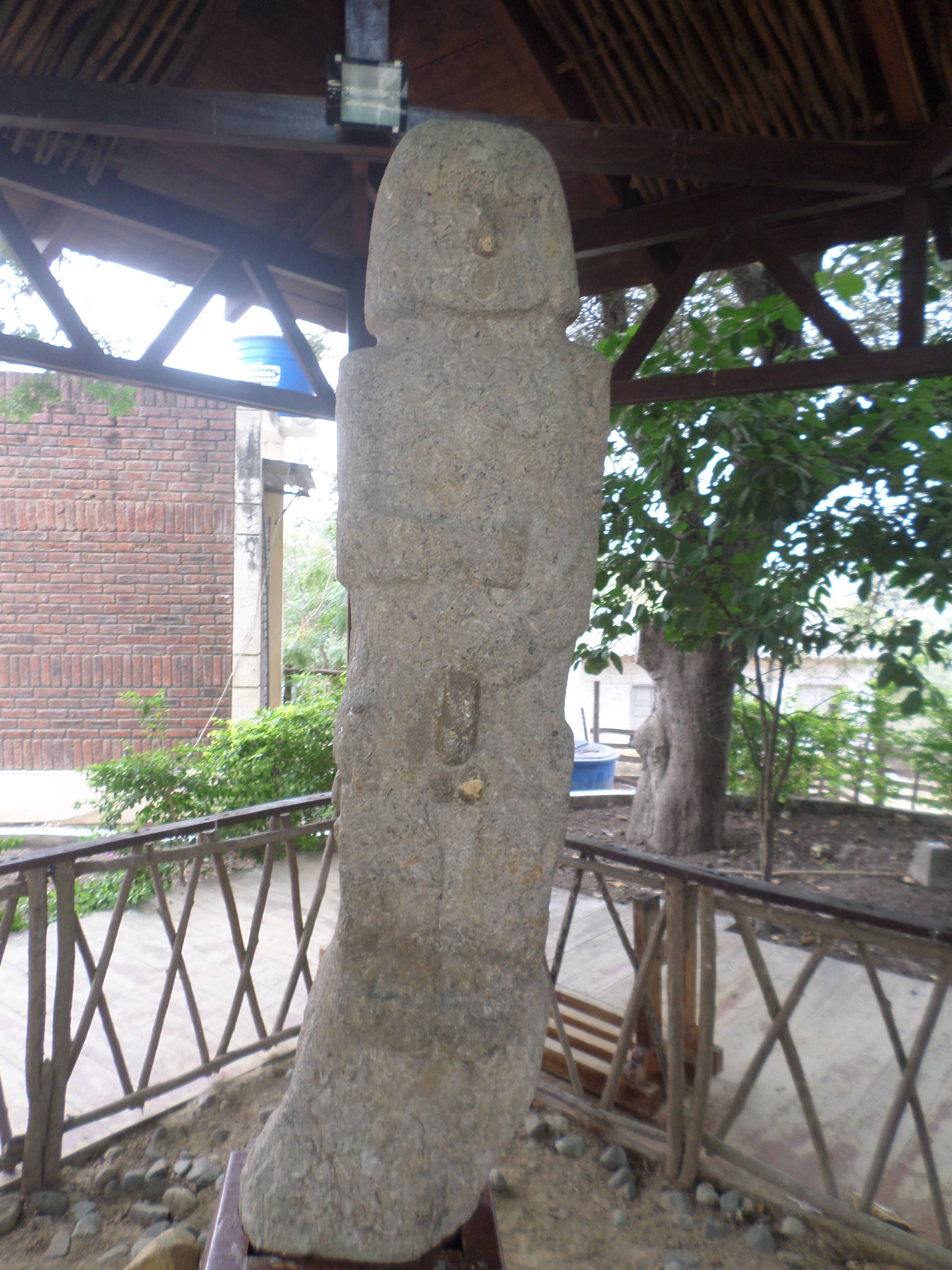 Tótem icónico de Sacachún